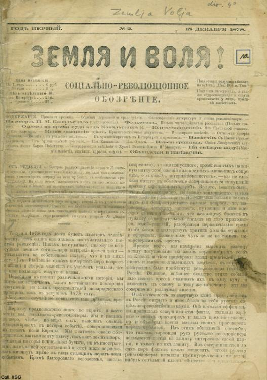 Prima pagina di « Zemlja i Volja !», n. 2, dicembre 1878